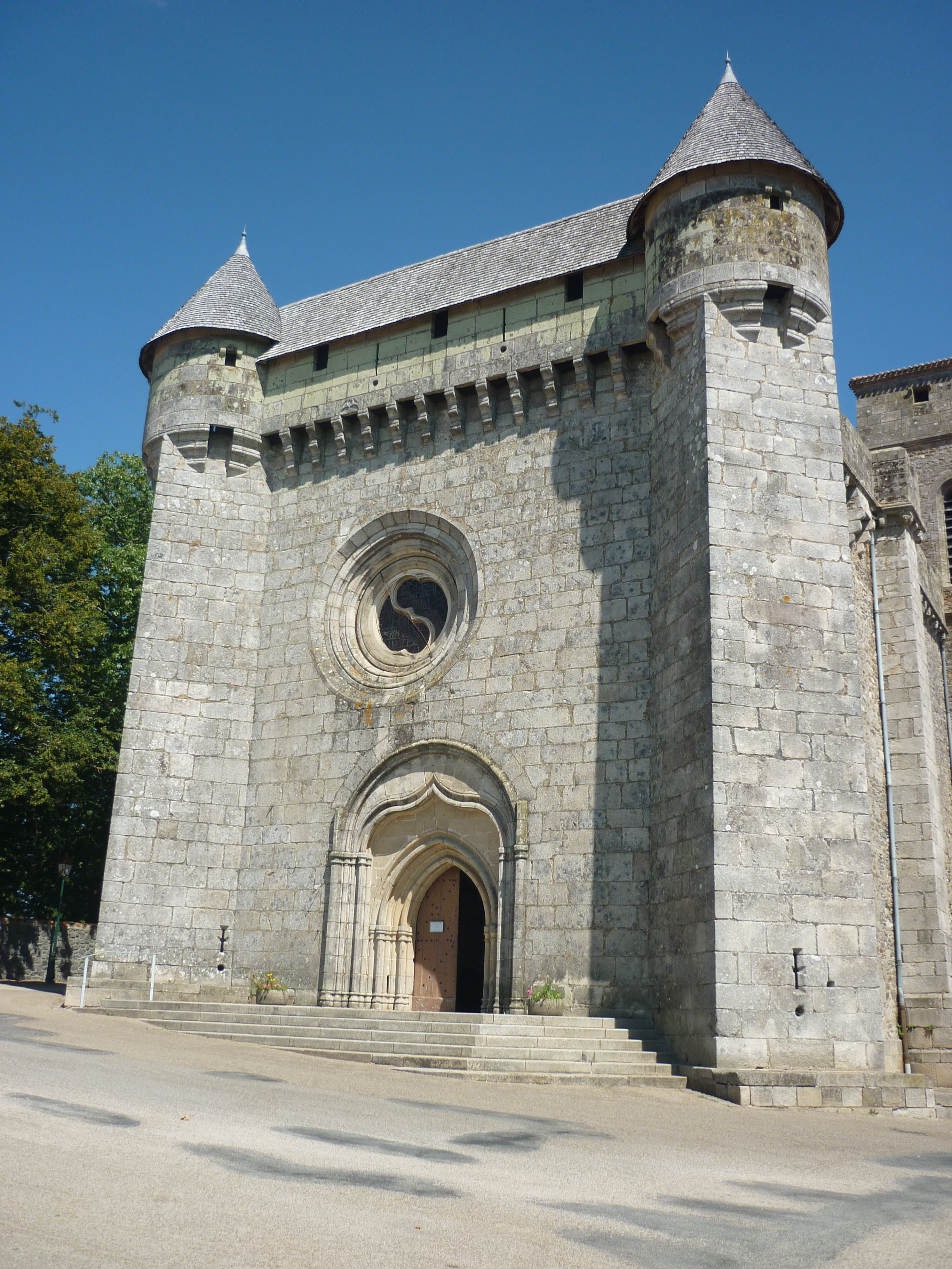 Eglise fortifiée du Boupère